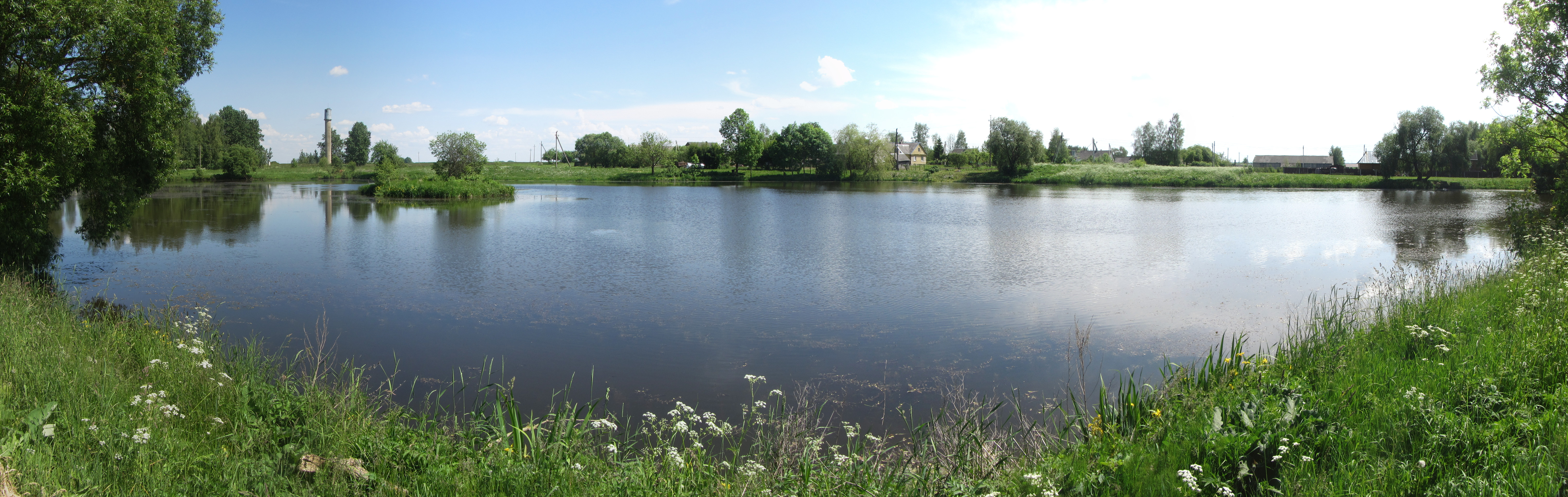 Kasčiukiškės 56103, Lithuania